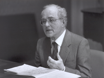 Francesco Bussi, musicologo piacentino